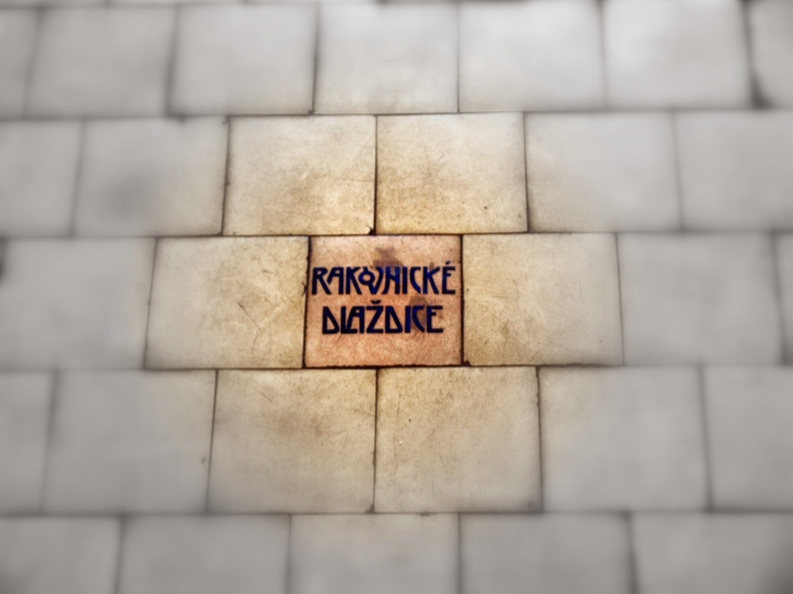 RAKO dlažba ve staré čistírně odpadních vod (Praha-Bubeneč)